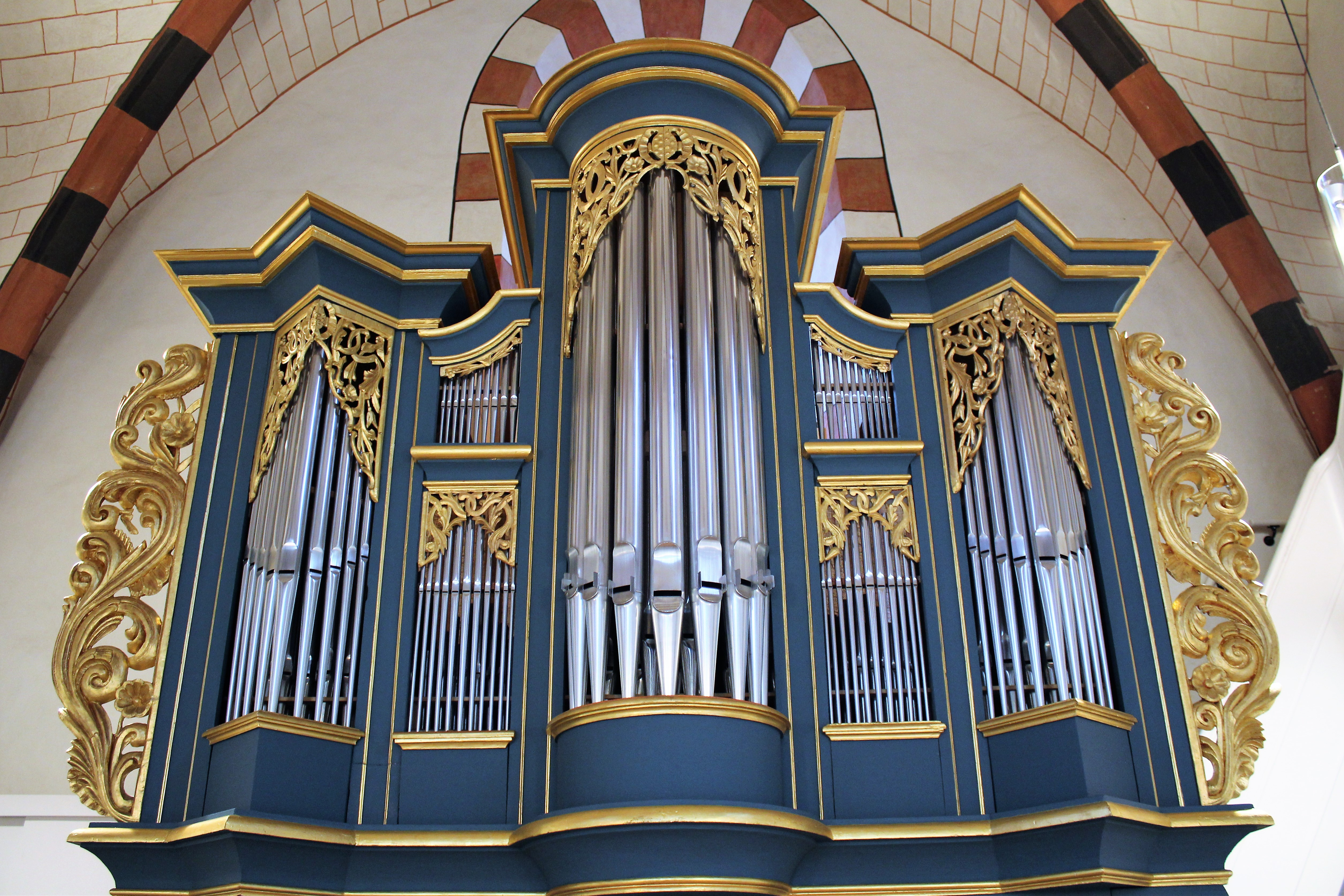 Evanglische Kirche Rüdigheim (Neuberg), Main-Kinzig-Kreis, Hessen, Deutschland